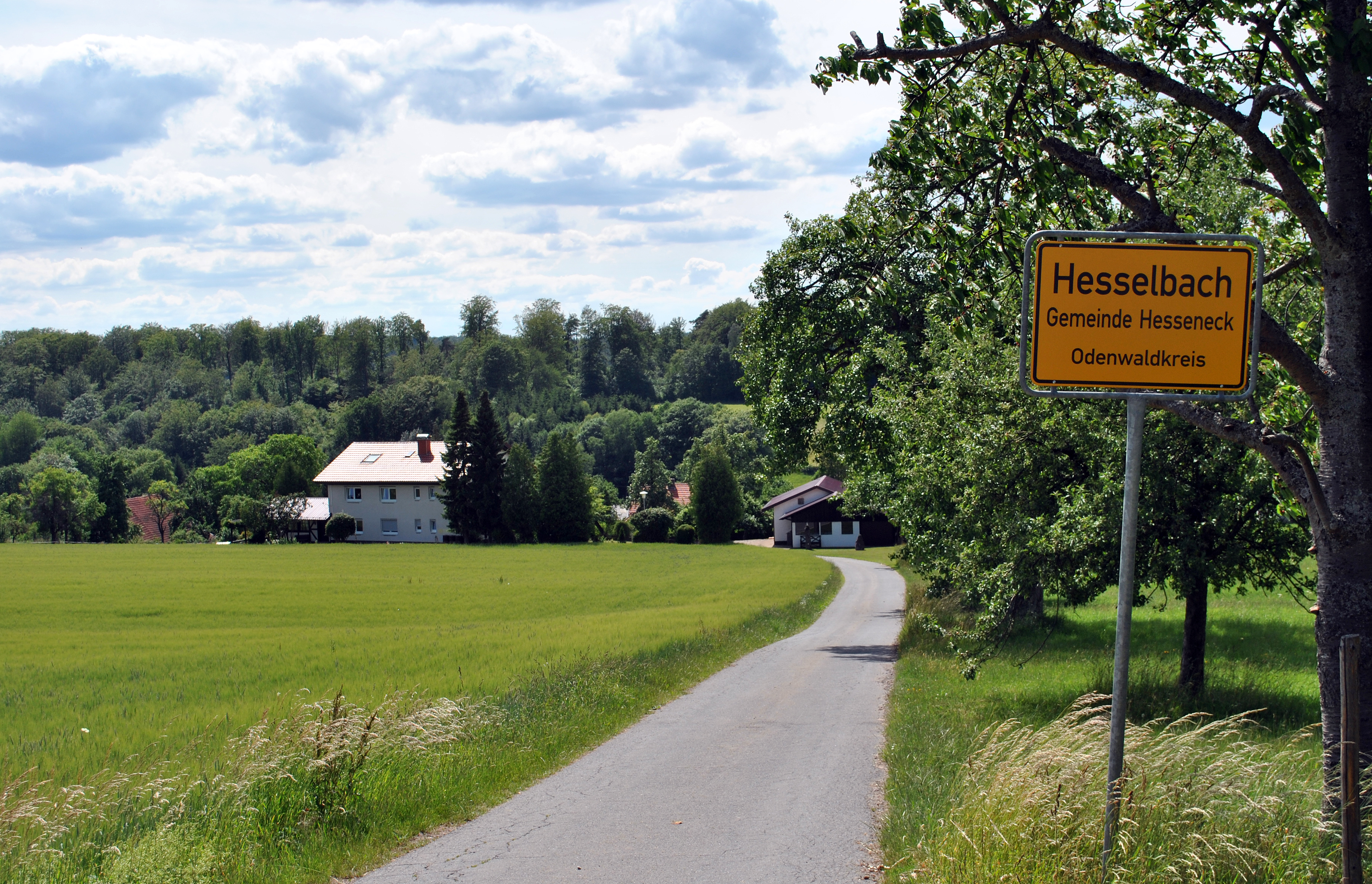 "Unterdorfstraße" am südlichen Ortsrand von Hesselbach